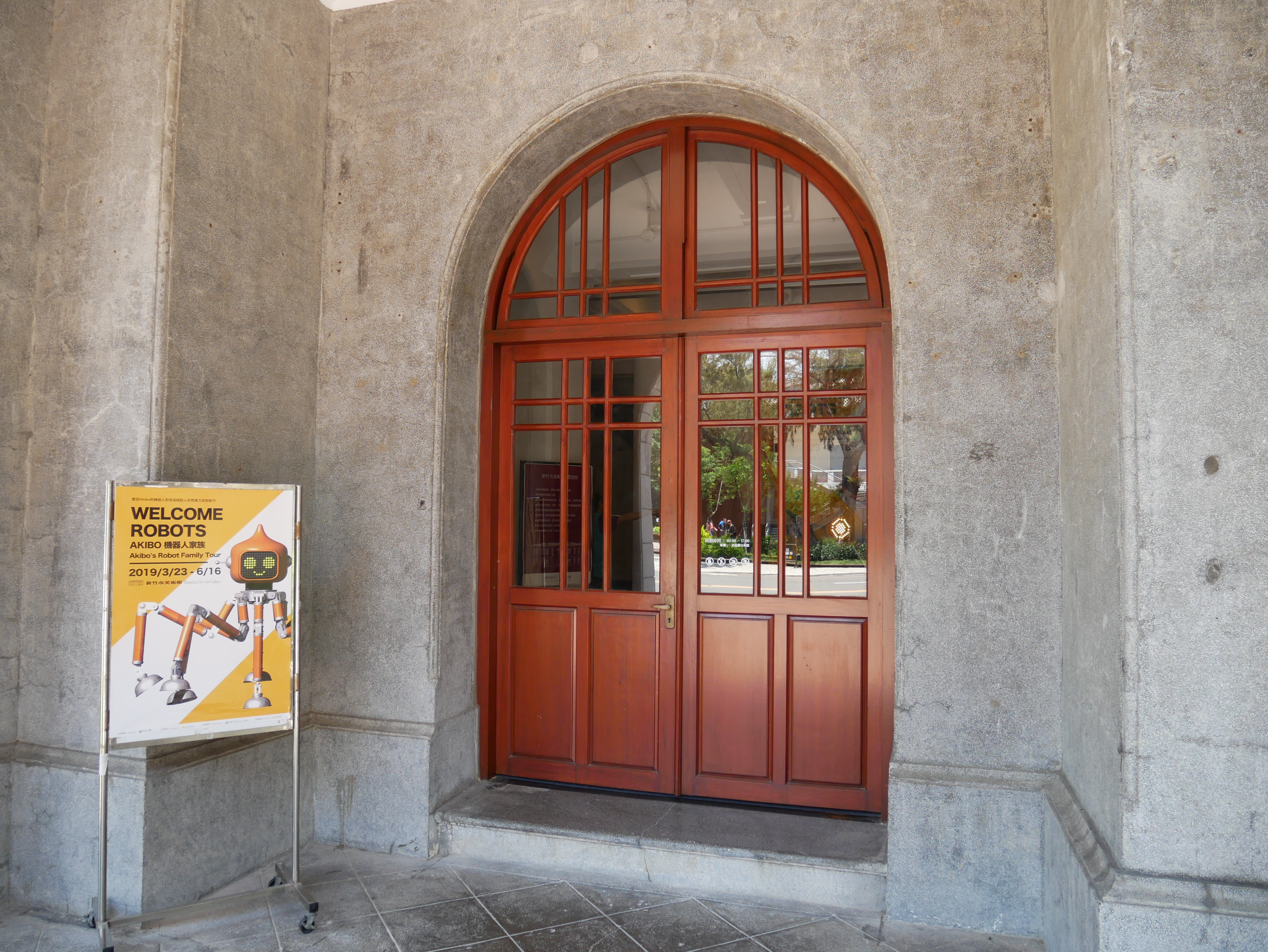 中文（台灣）: 新竹市役所入口，新竹市東區東門聯里中正里